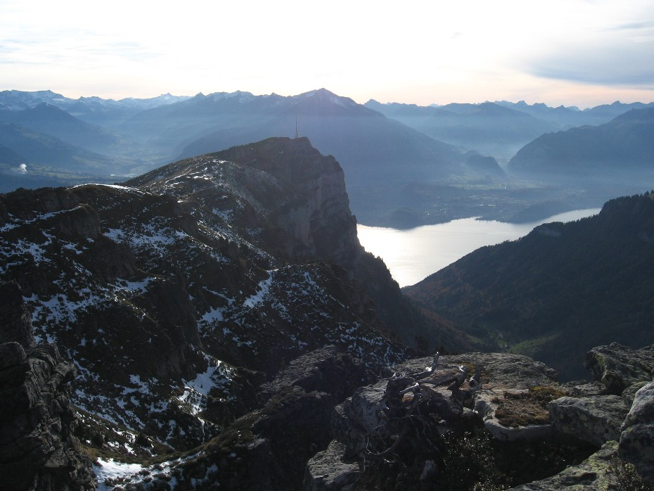 Niederhorn aus Nordost vom Güggisgrat